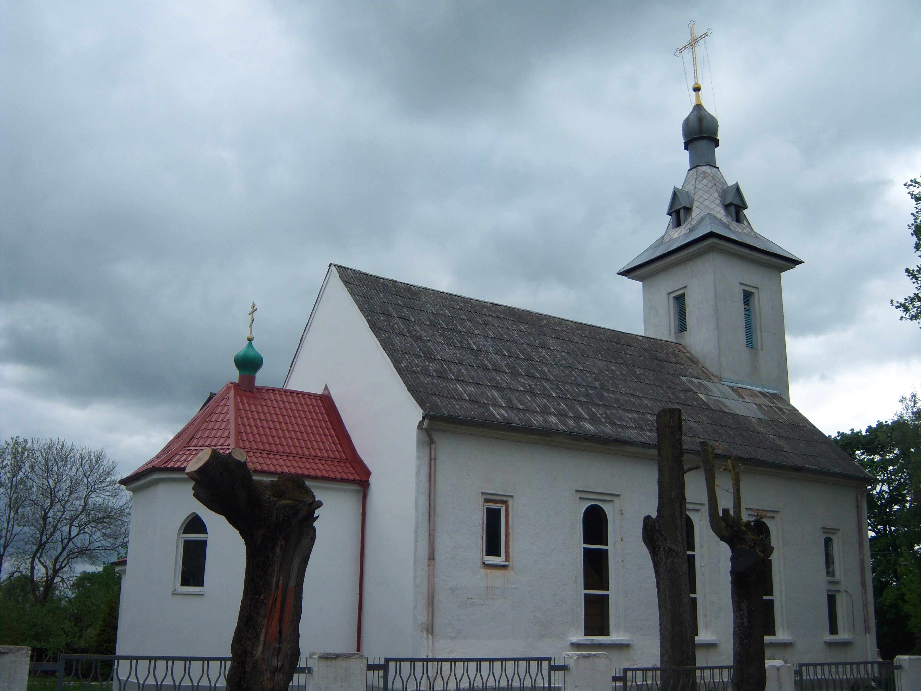 Фото сделано весной, во время путешествия на восток Калининградской области